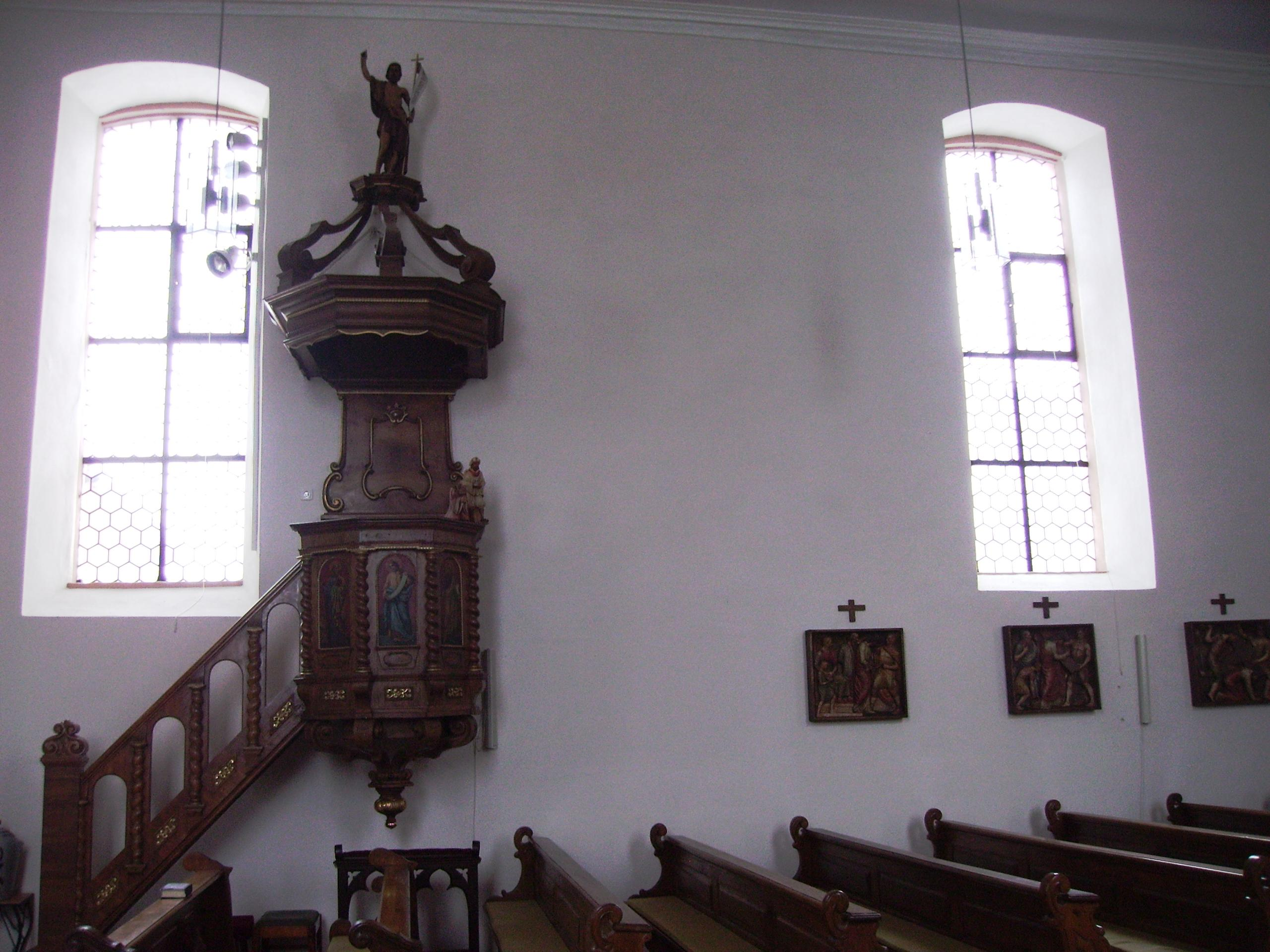 Kanzel, Kreuzweg (Blick gen Süden)